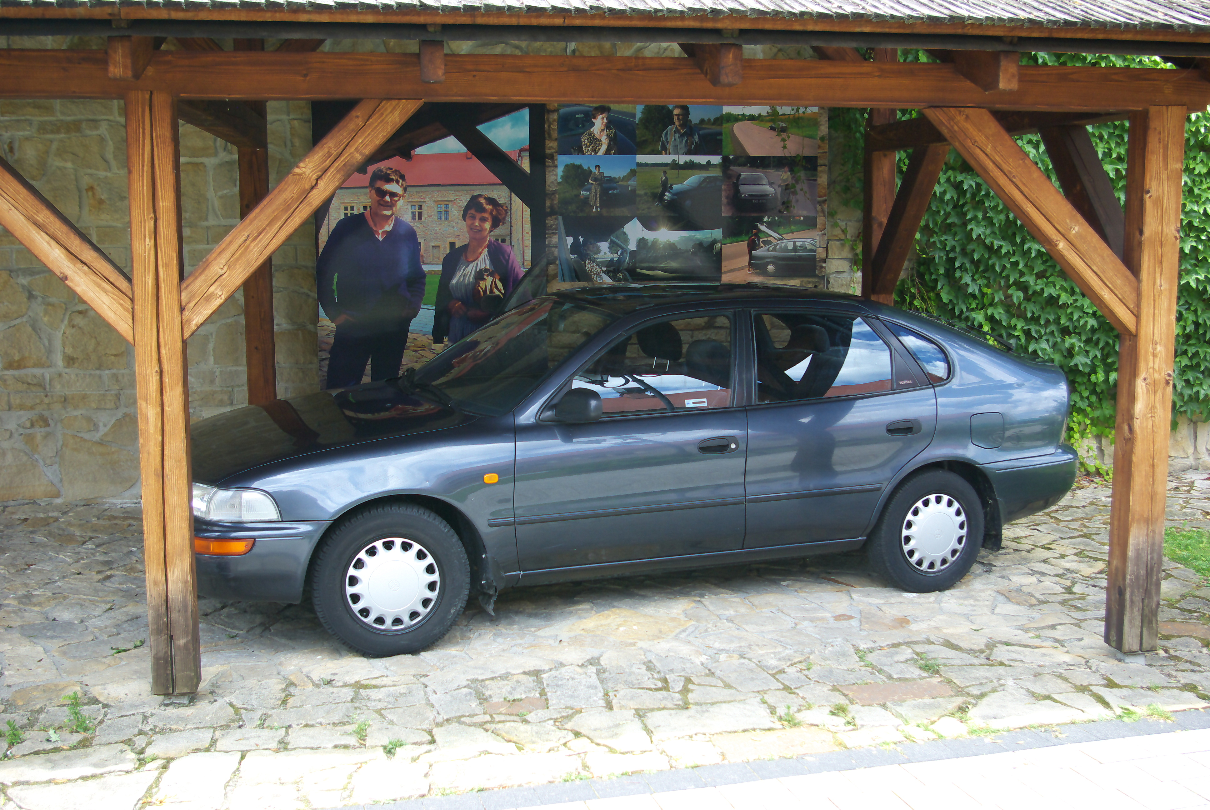 Samochód marki Toyota, należący w przeszłości do Zdzisława i Zofii Beksińskich, wystawiony w połowie 2019 przed Zamkiem Królewskim w Sanoku.